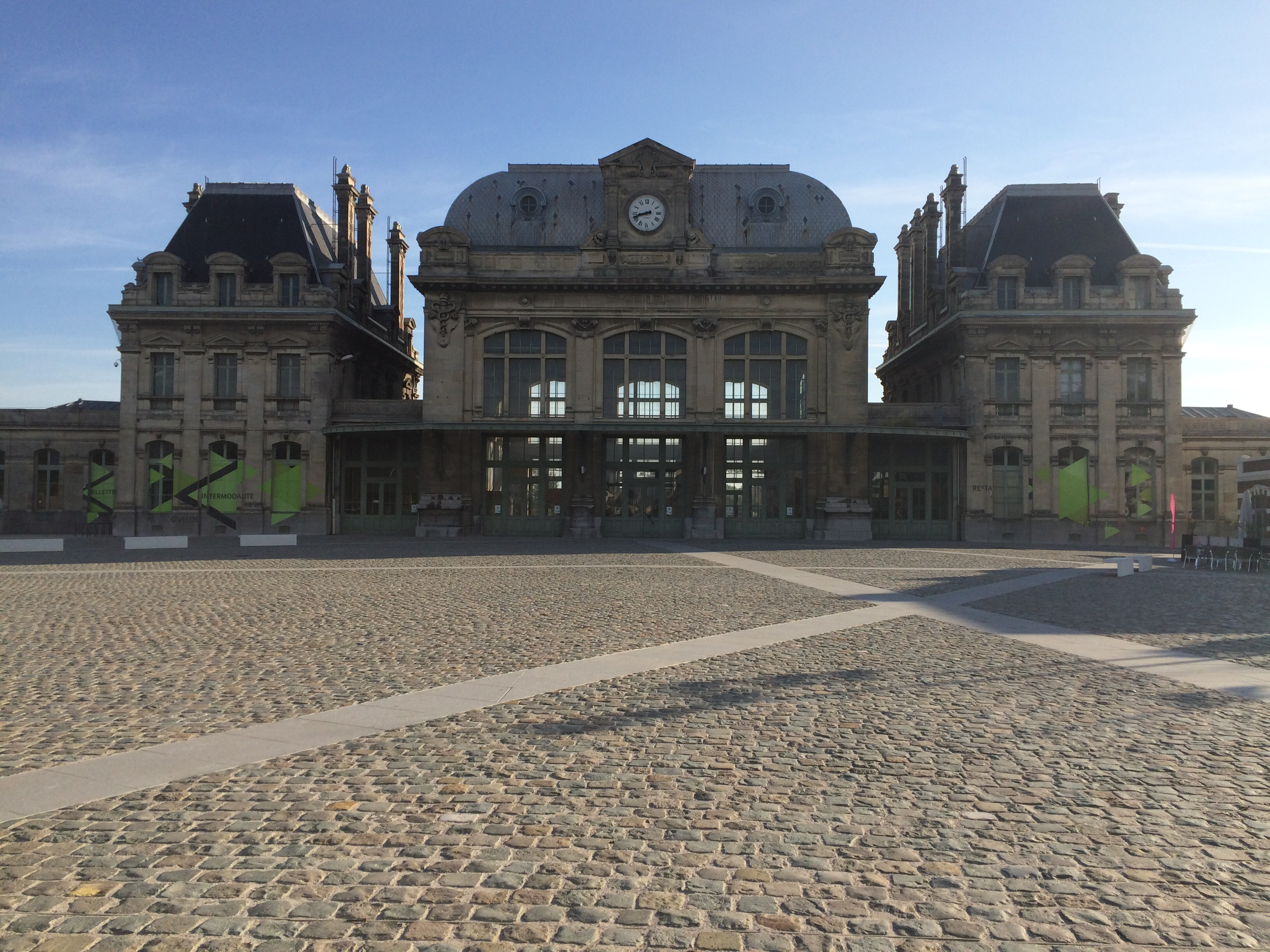 Gare de Saint-Omer